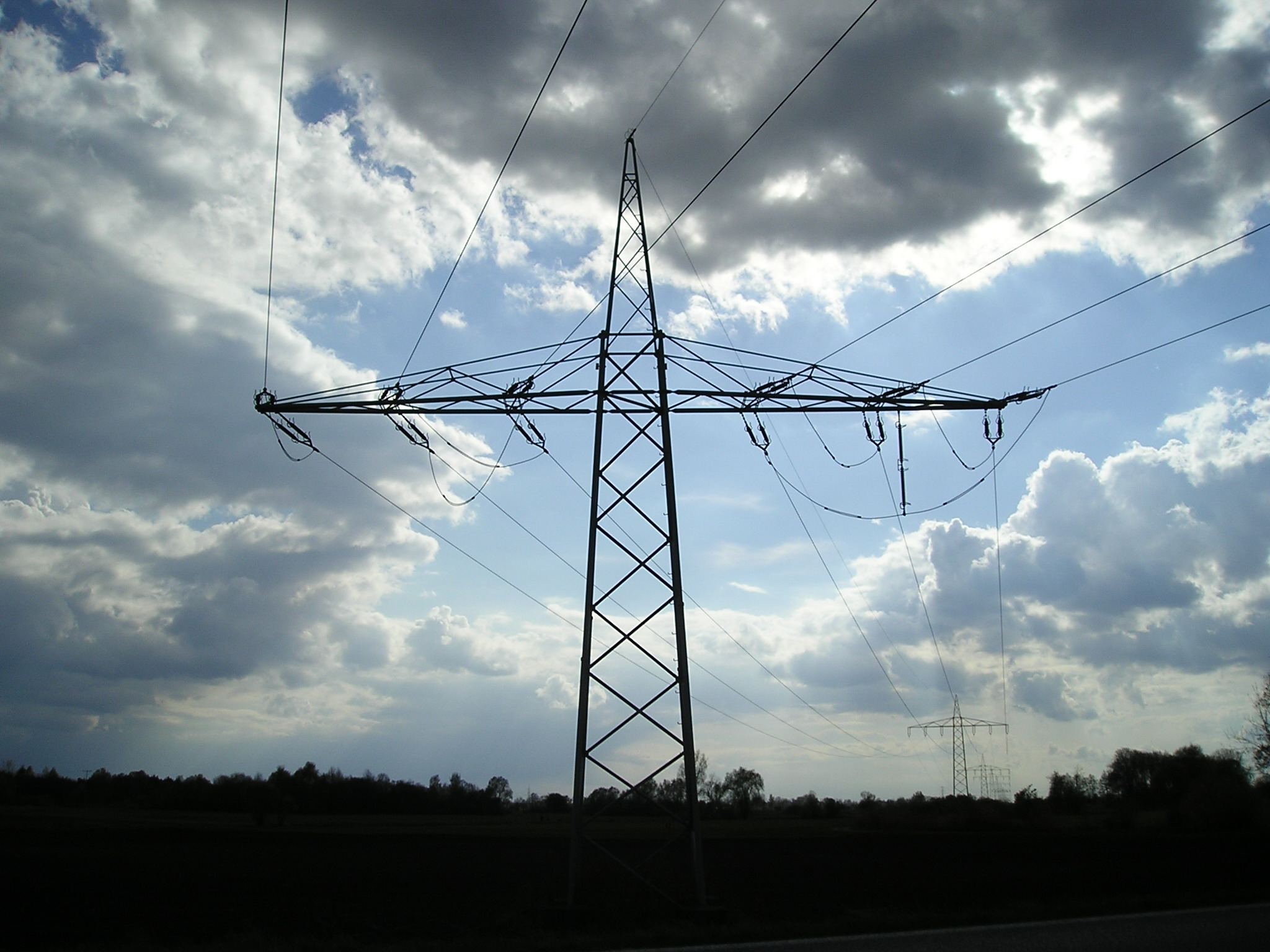 Verdrillmast bei Oberwöhr (Landkreis Pfaffenhofen a.d.Ilm)